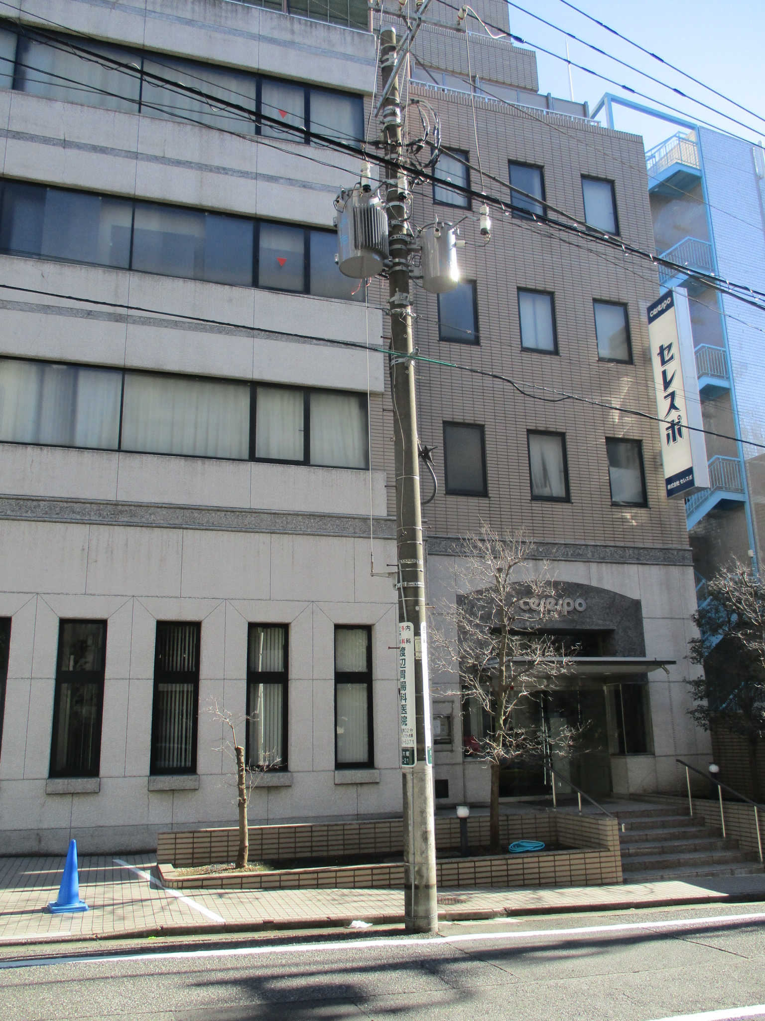 セレスポ本社ビル